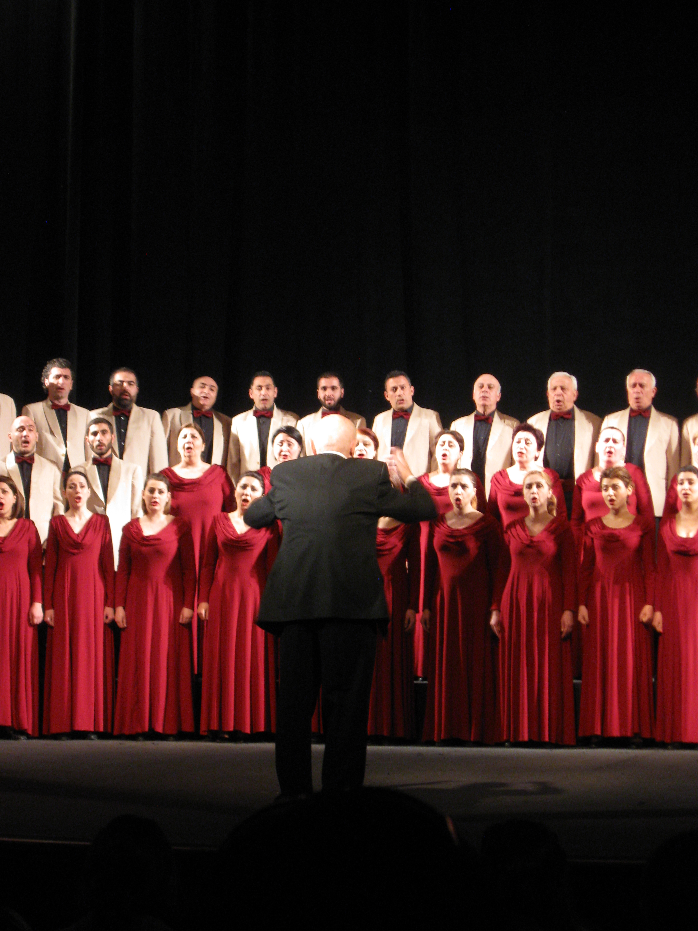 Հայաստանի պետական ակադեմիական երգչախմբի հյուրախաղերը Գյումրիում: 30.03.2017